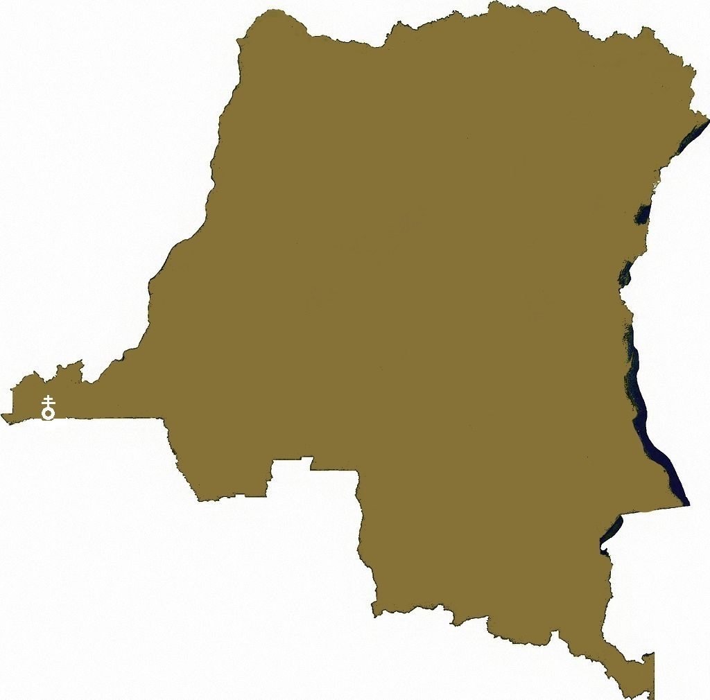 kaart congo